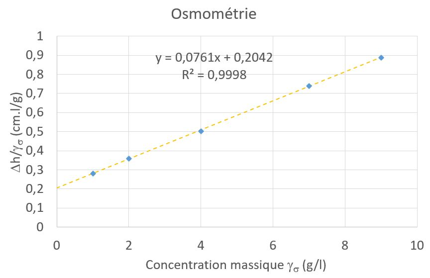 Graphe créé selon Atkins Peter William, Éléments de chimie physique, De Boeck Supérieur, 1998, 512 p. (ISBN 978-2-7445-0010-7, p. 141) Détermination de la masse molaire du PVC par osmométrie